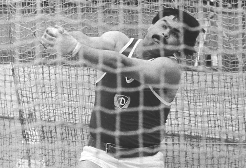 Detlef Gerstenberg ADN-ZB Thieme 20.5.84 Karl-Marx-Stadt: Leichtathletik-Sportfest-Der Berliner Dynamo-Sportler Detlef Gerstenberg erreichte mit der persönlichen Bestleistung von 79,22 m im ausgezeichneten Siegerergebnis im Hammerwerfen.